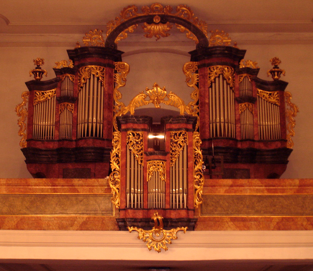 Die Orgel der Pfarrkirche St.Katharina in Wien-Atzgersdorf (Spätbarockes,1784 erbautes Orgelgehäuse).